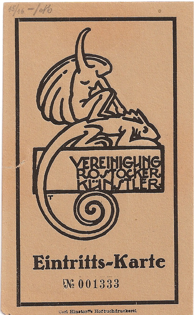 Eintrittskarte Ausstellung "Vereinigung Rostocker Künstler" 1920 - Entwurf Egon Tschirch